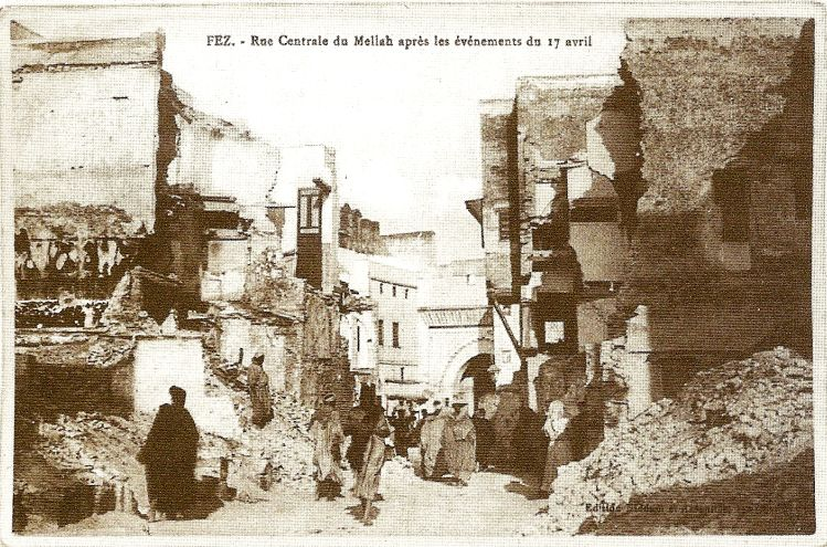 הריסות המלאח של פאס (1912)